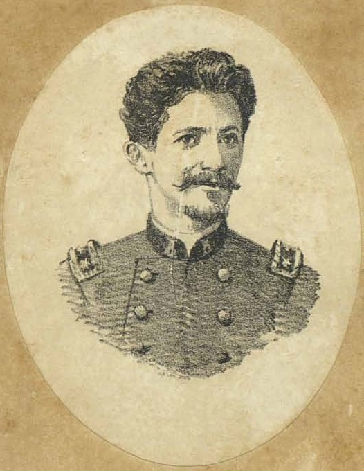 Major Innocencio Serzedello Corrêa